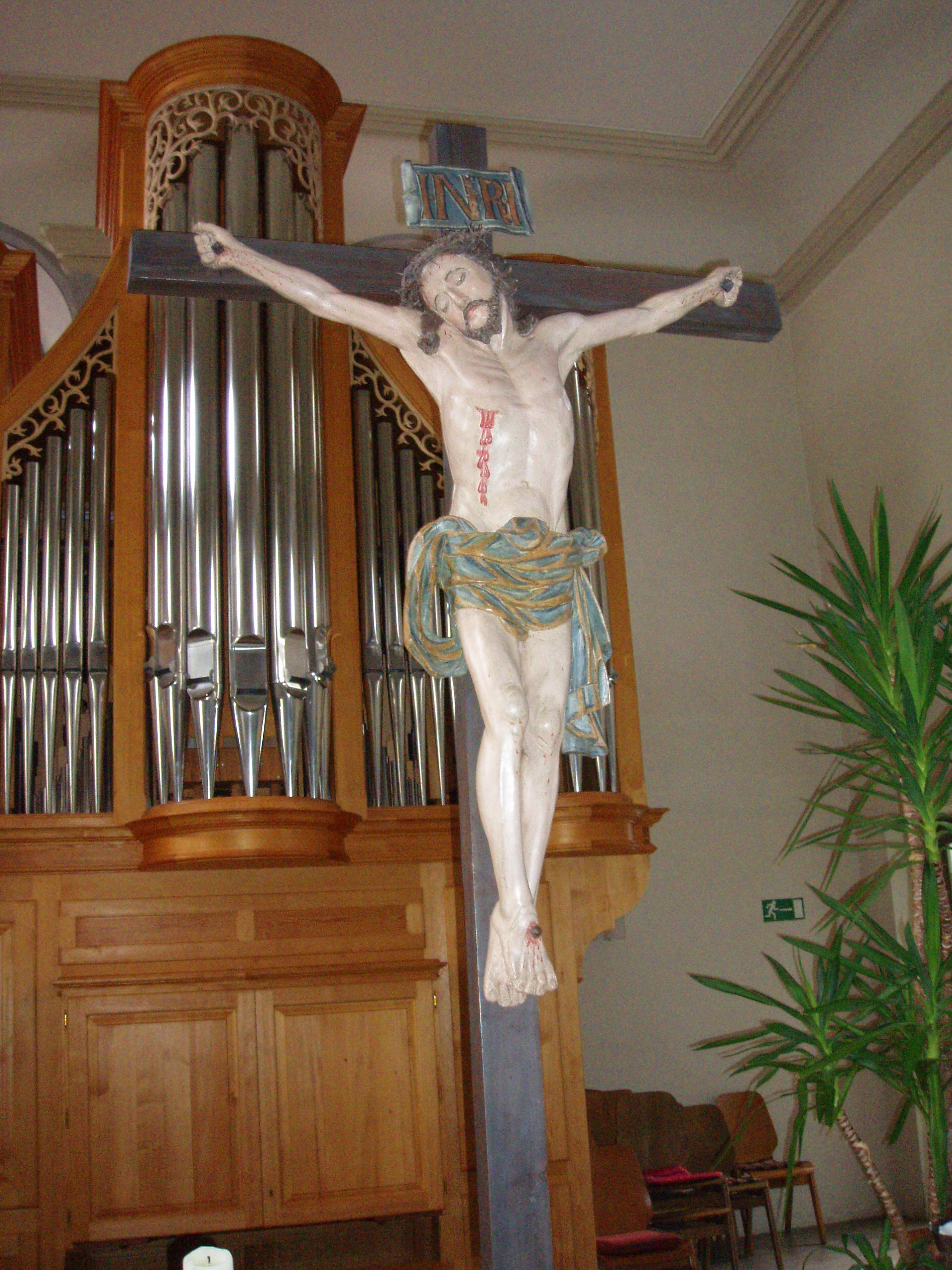 St. Cyriakus, Kruzifix von 1711